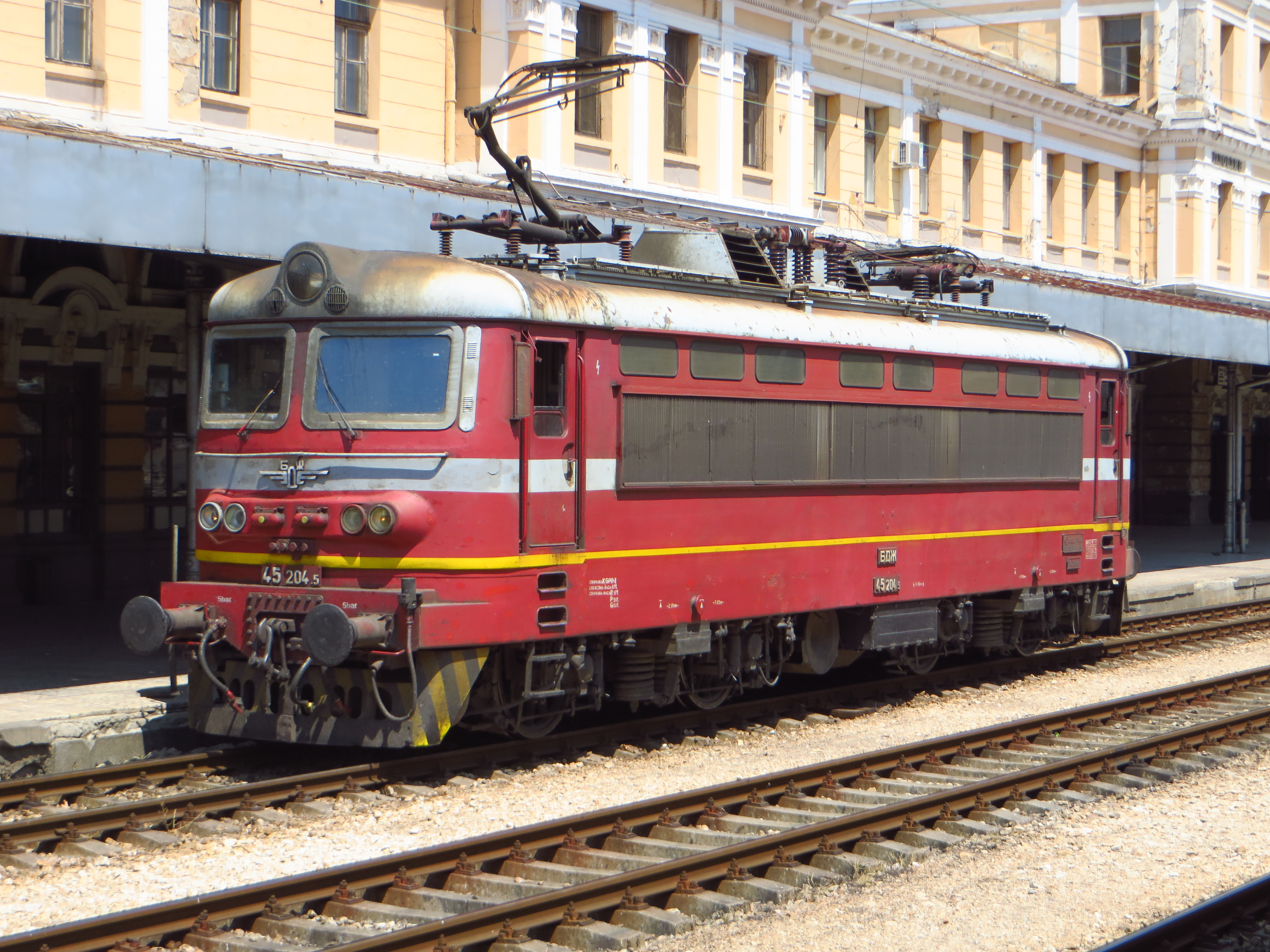 45 204.5 на Централна ЖП Гара Пловдив - 6 Август 2016г.